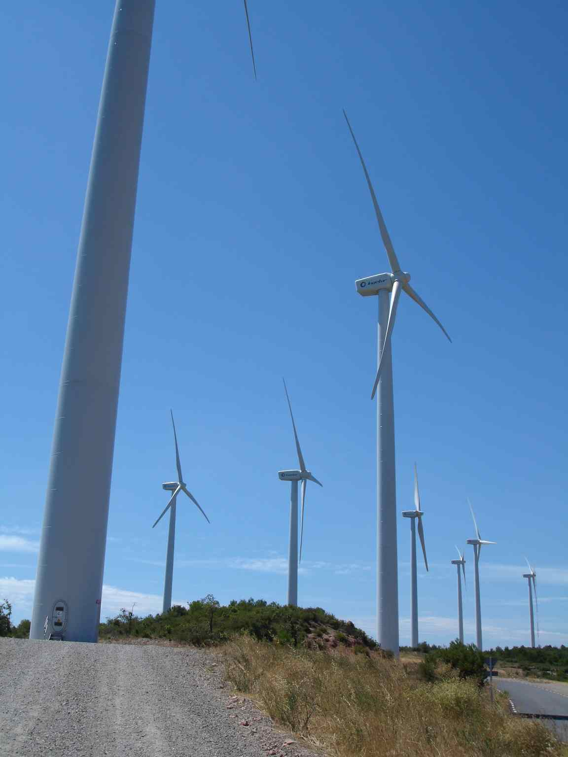 Molins de vent, Serra de Rubió (Rubió, l'Anoia, Barcelona)